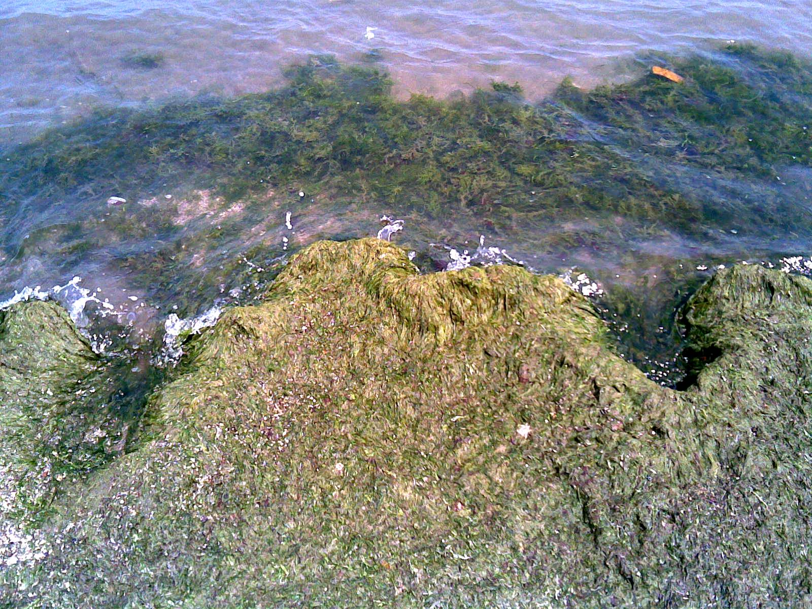 Sumqayıt, Xəzərin sahili